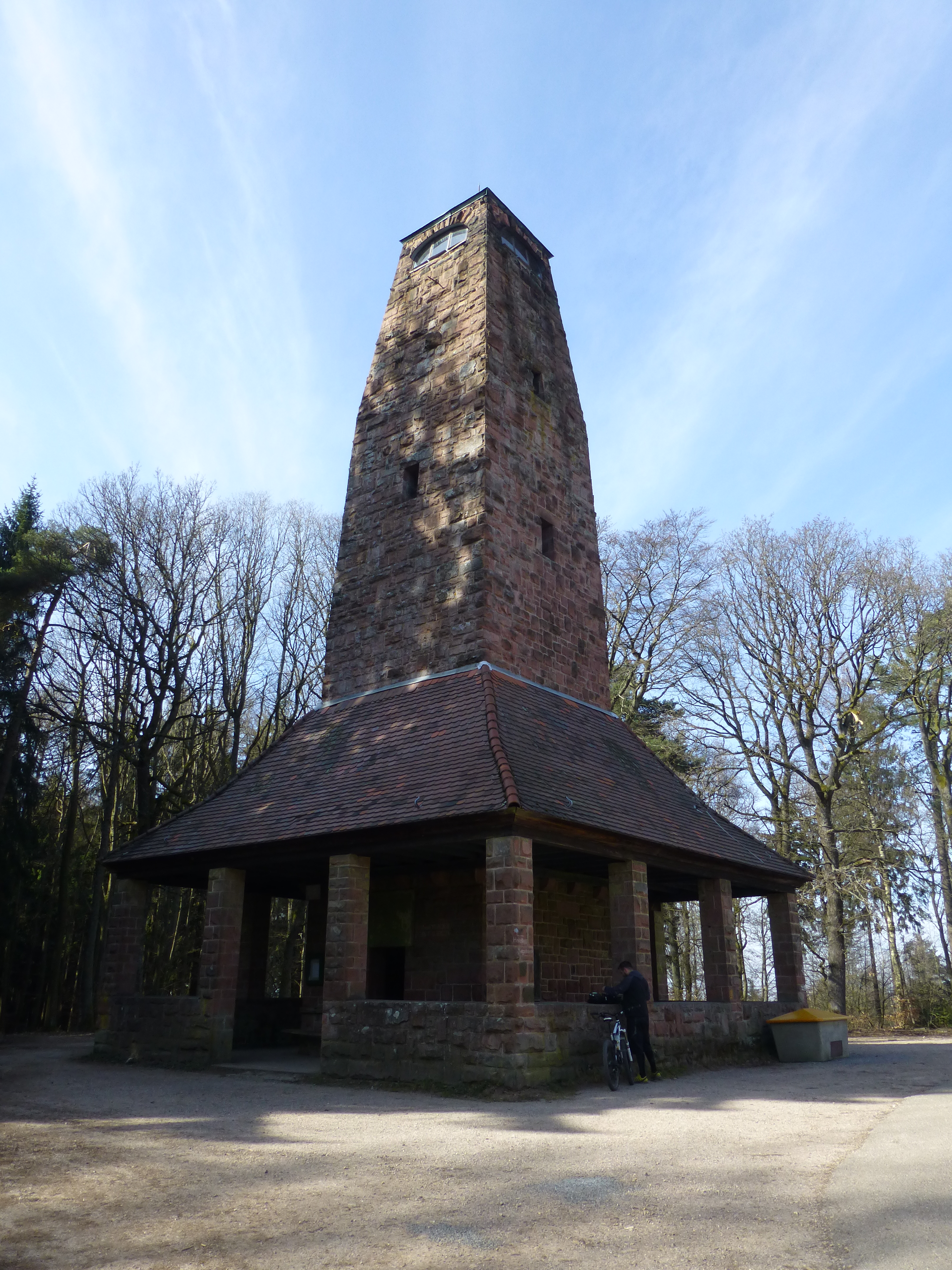 Weisser-Stein Turm